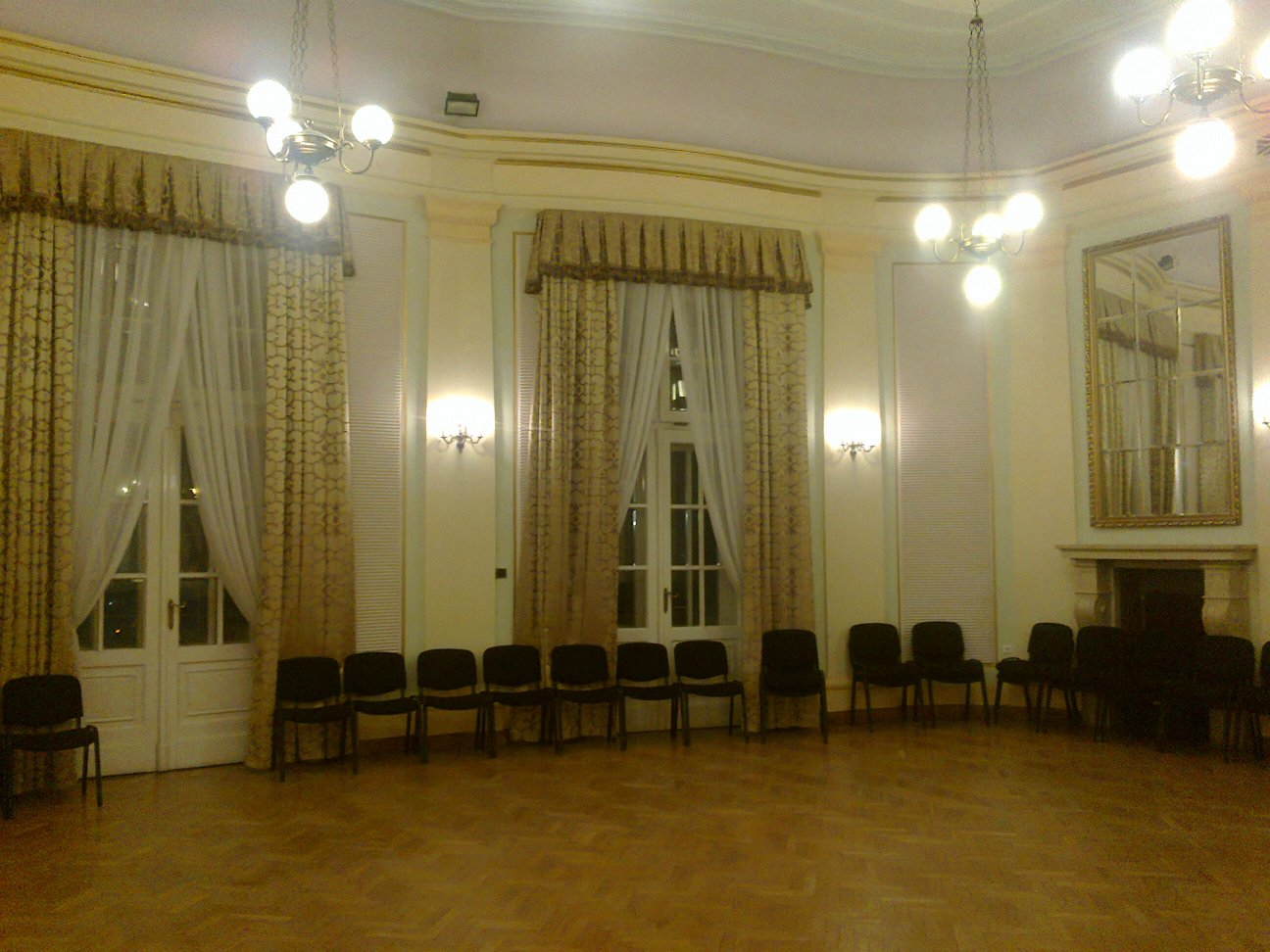 Filharmonia Krakowska_Złota_Sala